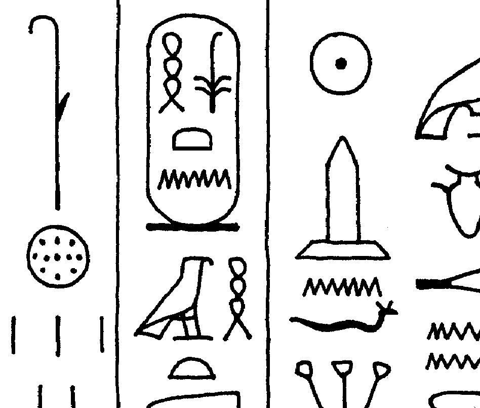 king Huni on the recto of the Palermo stone, rule of Neferirkare in the fifth year - record